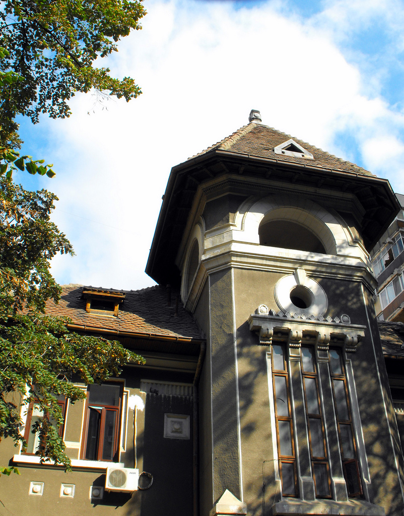 Iancului 3